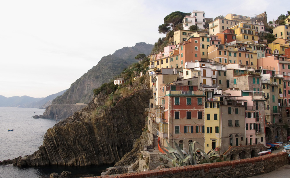 Riomaggiore, Cinque Terre, Italie